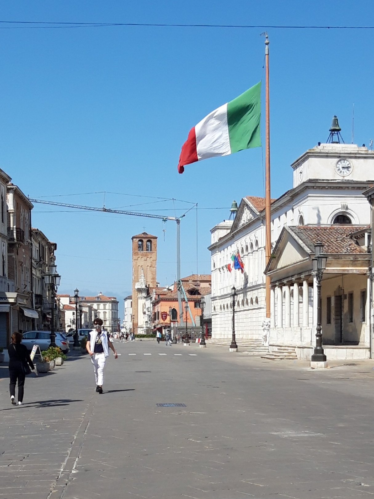 Chioggia corso del Popolo.